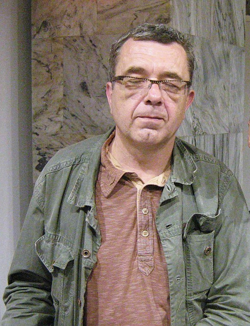 Grzegorz Miecugow (ur. 22 listopada 1955 w Krakowie) - polski dziennikarz